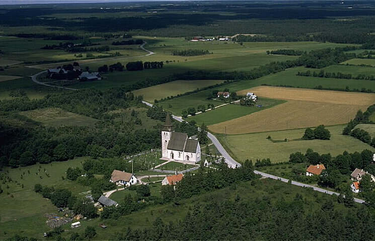 Motiv: Norrlanda kyrka Nyckelord: Flygbilder, Riksintressen Kategori: KyrkomiljöNorrlanda kyrka